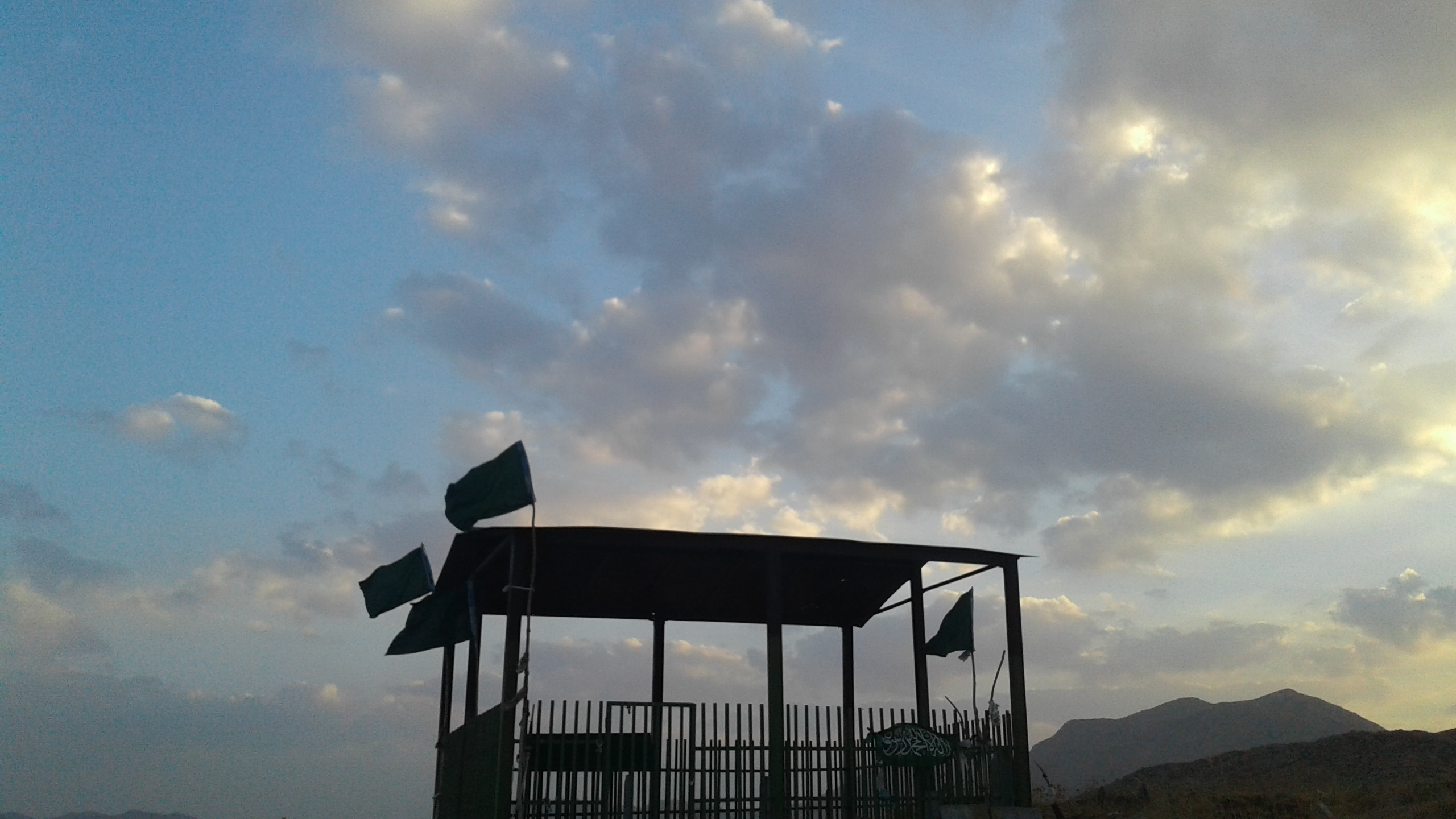 مکان زیارتی روستای کول